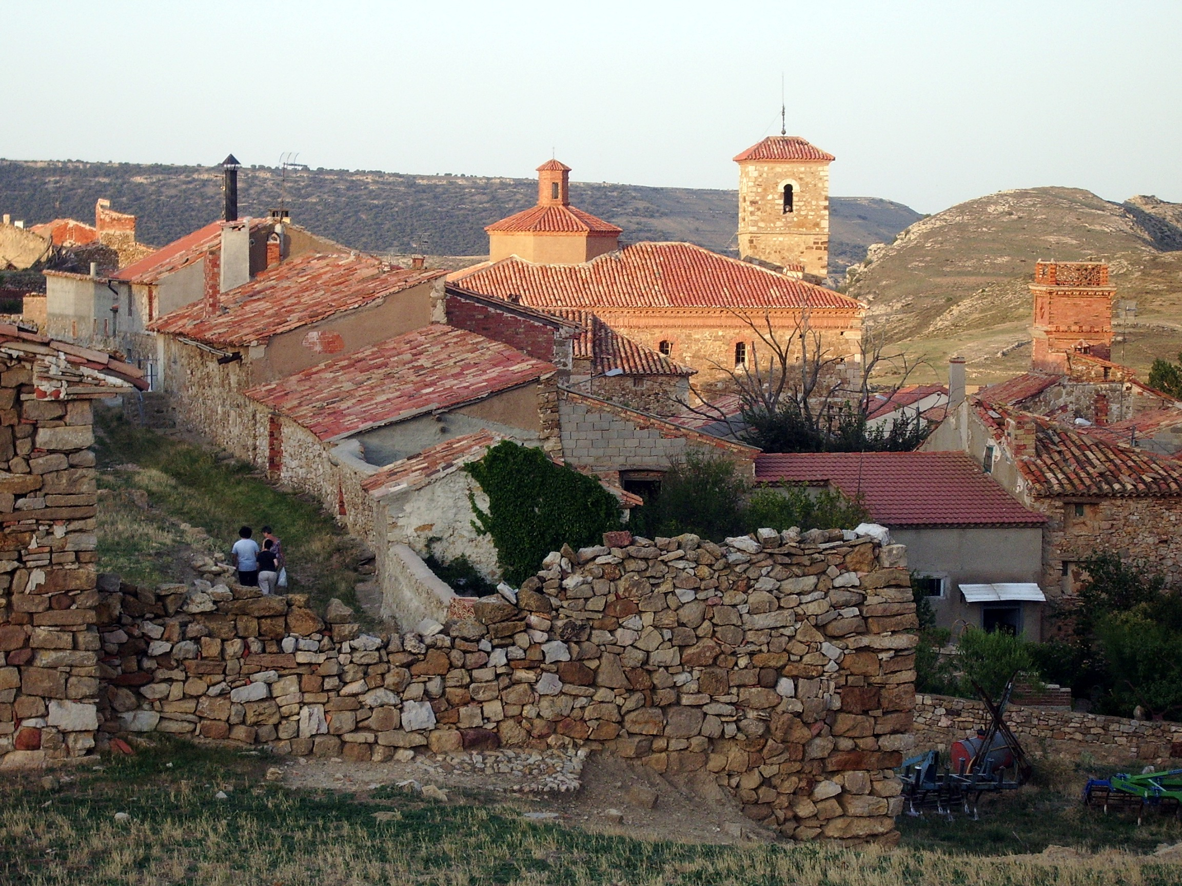 Portalrubio (Comarca de Teruel, Teruel)